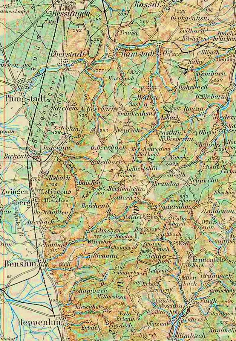 Landkarte (1914) der Flasergranitoidzone (Odenwald)